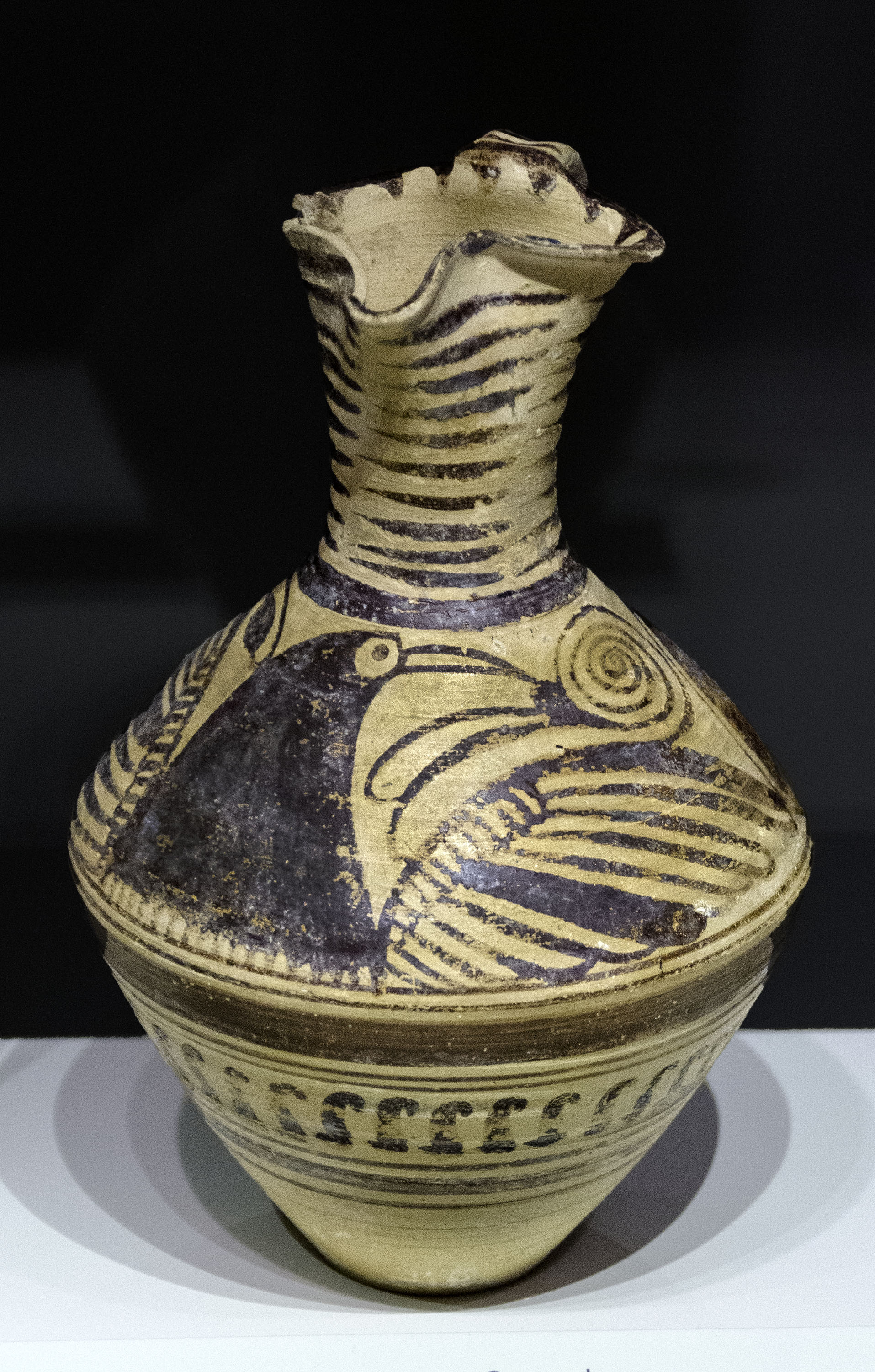 Enócoe ibérico de la Necrópolis del Cabezo del Tío Pío (Archena, Murcia). El cuerpo se divide en dos frisos delimitados por bandas y líneas, el inferior decorado con «eses» verticales, y en el superior un ave con las alas abiertass y motivos florales. Siglos III-II a. C. Altura: 20,50 cm; Diámetro base: 4,20 cm; Diámetro boca: 6,80 cm. Nº inv. 1941/46/44. Museo Arqueológico Nacional de España.